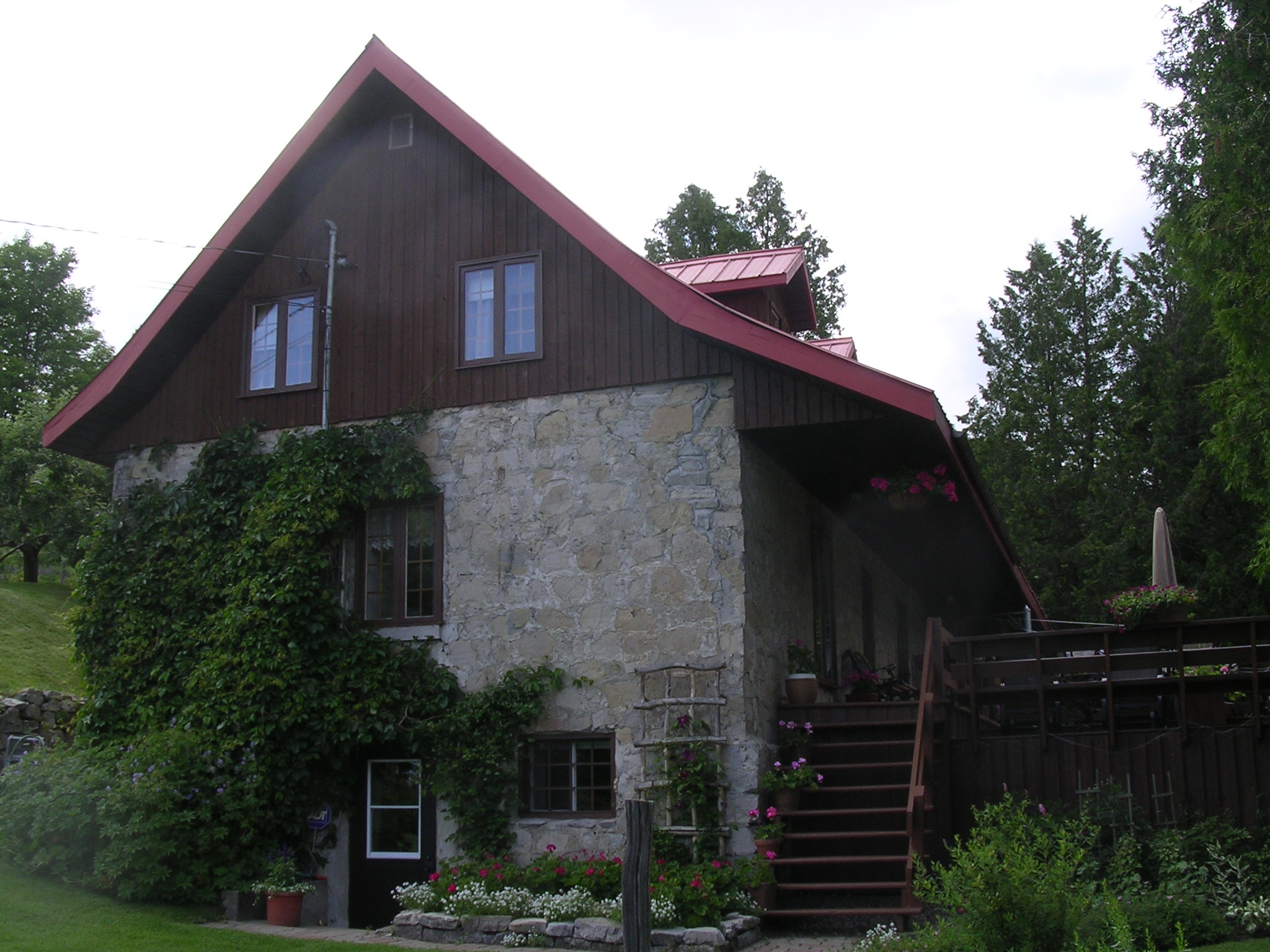 Ancien moulin à carder à Baie-Saint-Paul (Québec), sur le ruisseau Michel. Incendié vers 1968, ce moulin en pierres a été transformé en résidence privée. Il ne reste plus rien de ses mécanismes.